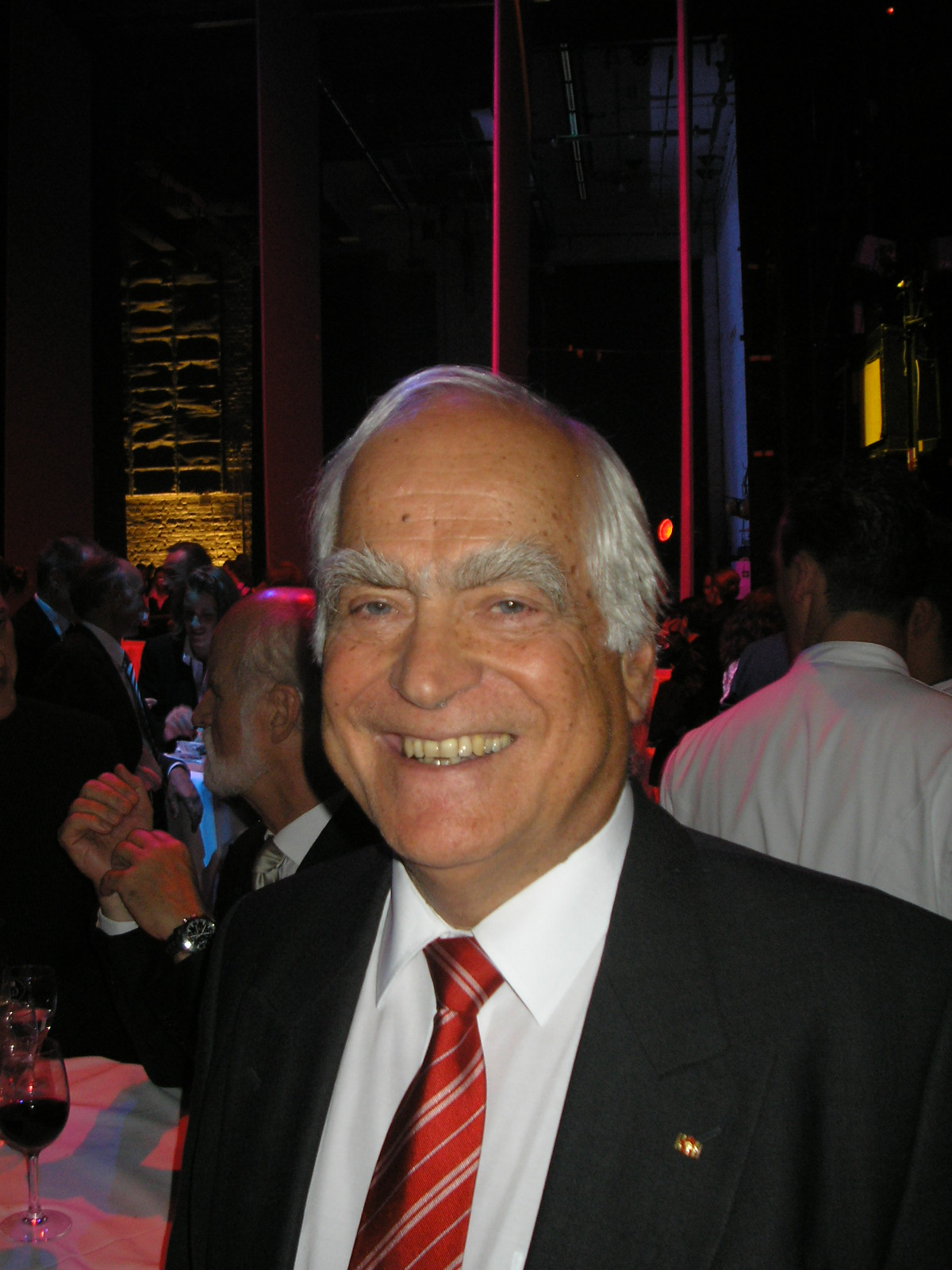 Peter Eigen, at the Komische Oper Berlin during the 2007 Quadriga event